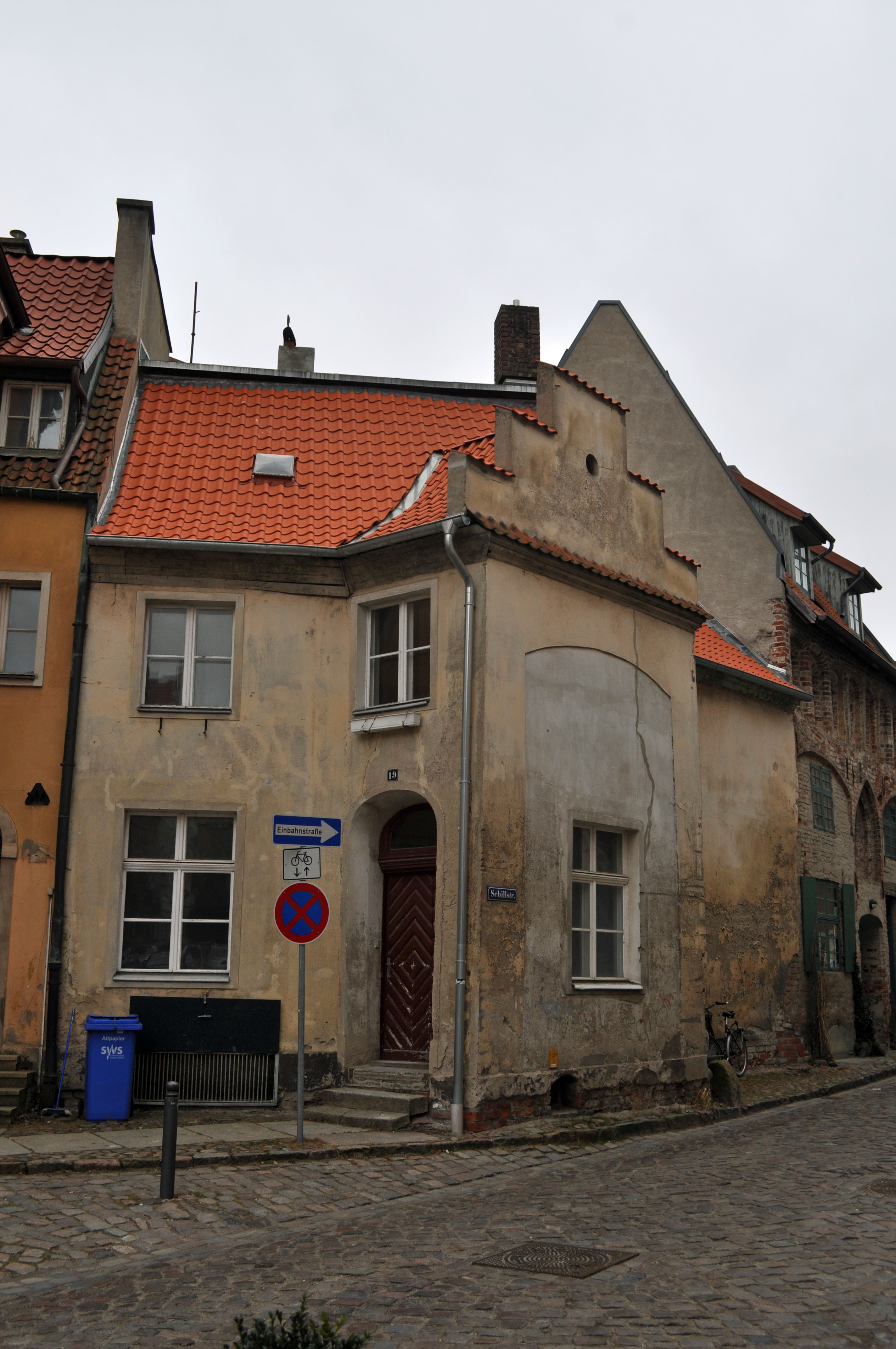 Gebäude bzw. Gebäudedetail in Stralsund. Straße und Hausnummer siehe Dateiname.